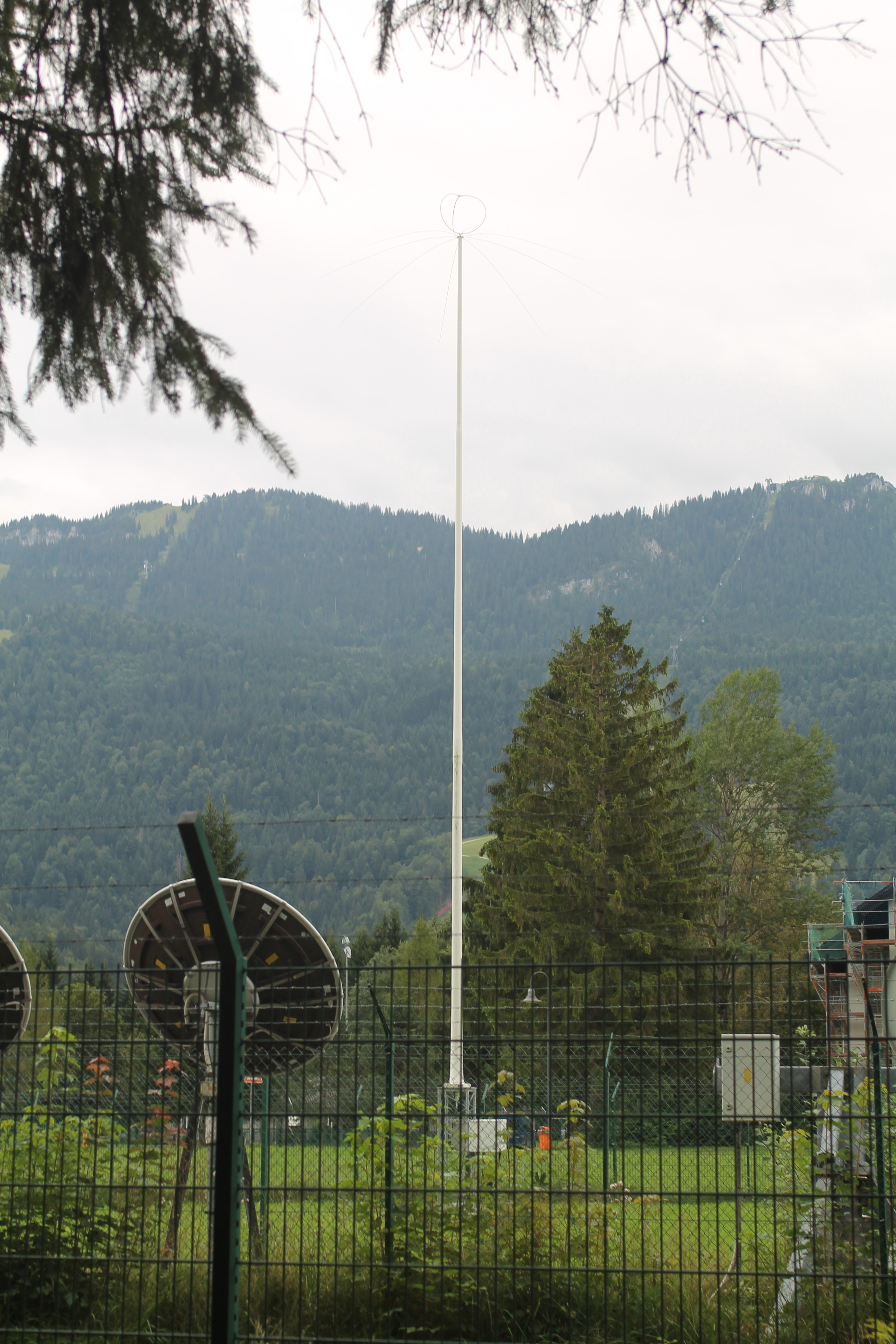 AFN-Mittelwellensendemast Garmisch-Partenkirchen